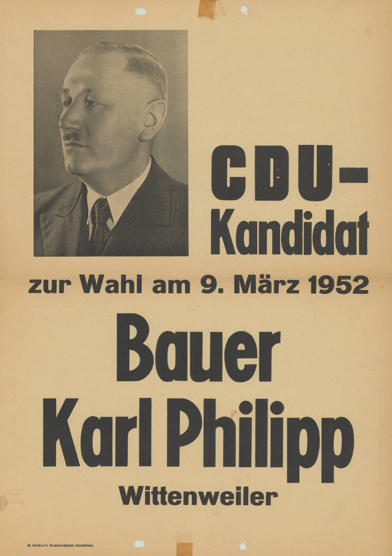 CDU- Kandidat zur Wahl am 9. März 1952 Bauer Karl Philipp Wittenweiler Abbildung: Porträtfoto Plakatart: Kandidaten-/Personenplakat mit Porträt Drucker_Druckart_Druckort: M. Rückert's Buchdruckerei, Gerabronn Objekt-Signatur: 10-002 : 126 Bestand: Landtagswahlplakate Baden-Württemberg (10-002) GliederungBestand10-18: Landtagswahlplakate Baden-Württemberg (10-002) » CDU Lizenz: KAS/ACDP 10-002 : 126 CC-BY-SA 3.0 DE